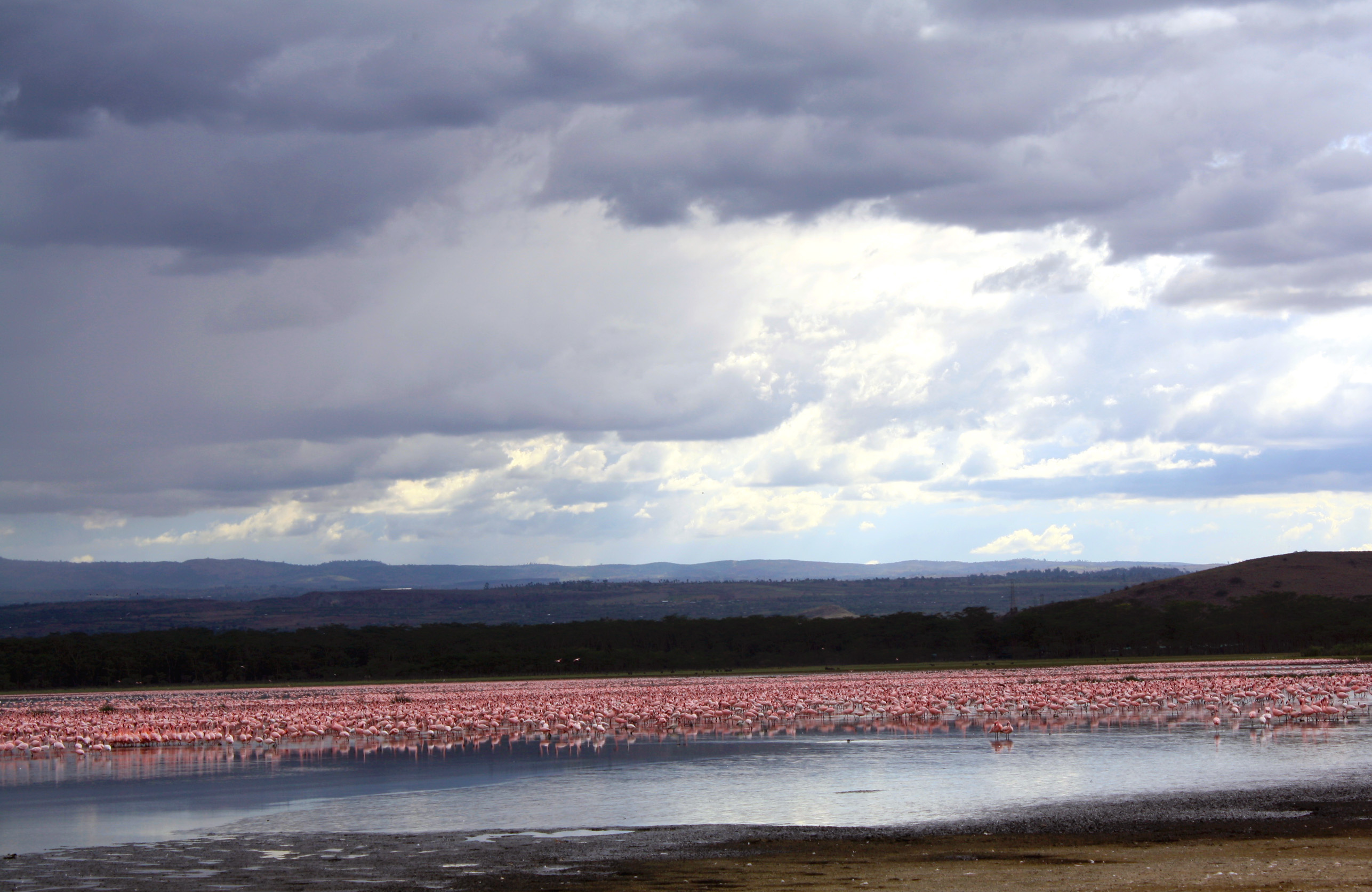 Кенійський Національний парк «Озеро Накуру», колонія рожевих фламінго. Африка, Кенія (Kenya).